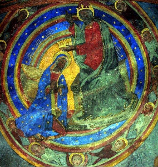 abside of S. Maria Assunta, Casalalta, Collazzone, Perugia, Umbria, Italy